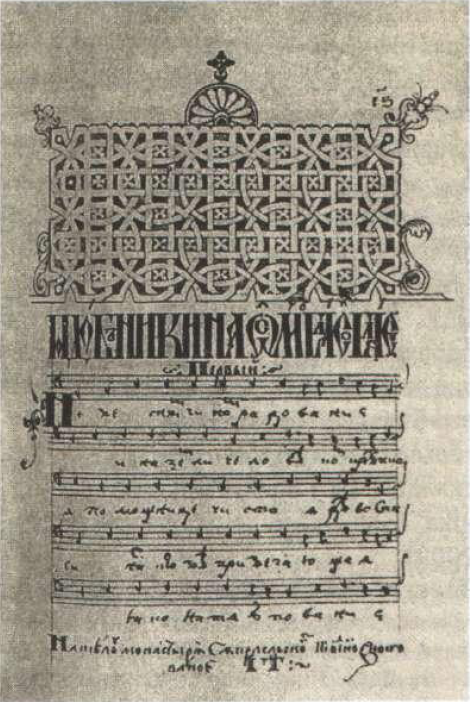 Багдан Анісімавіч. Супрасльскі ірмалой. 1601. Аркуш 428 Беларуская (тарашкевіца): Багдан Анісімавіч. Супрасьльскі ірмалой. 1601. Аркуш 428